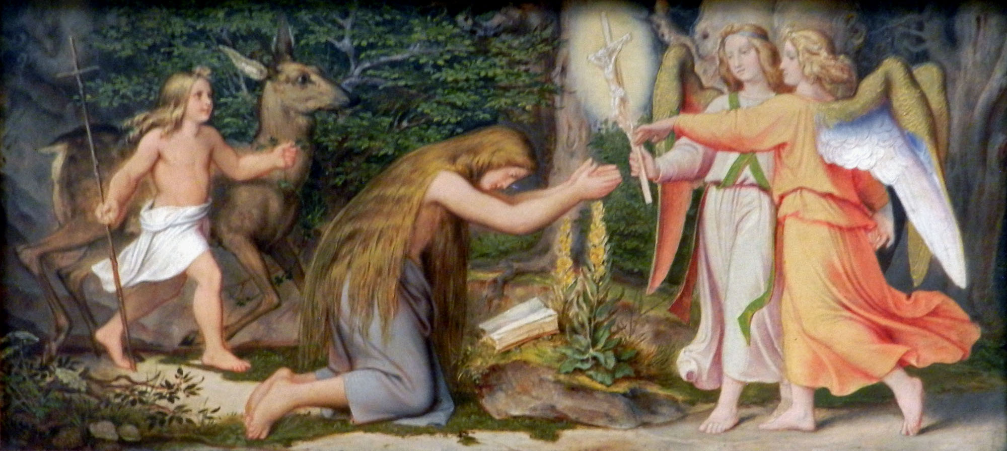 Genoveva in der Wildnistitle QS:P1476,de:"Genoveva in der Wildnis" label QS:Lde,"Genoveva in der Wildnis"